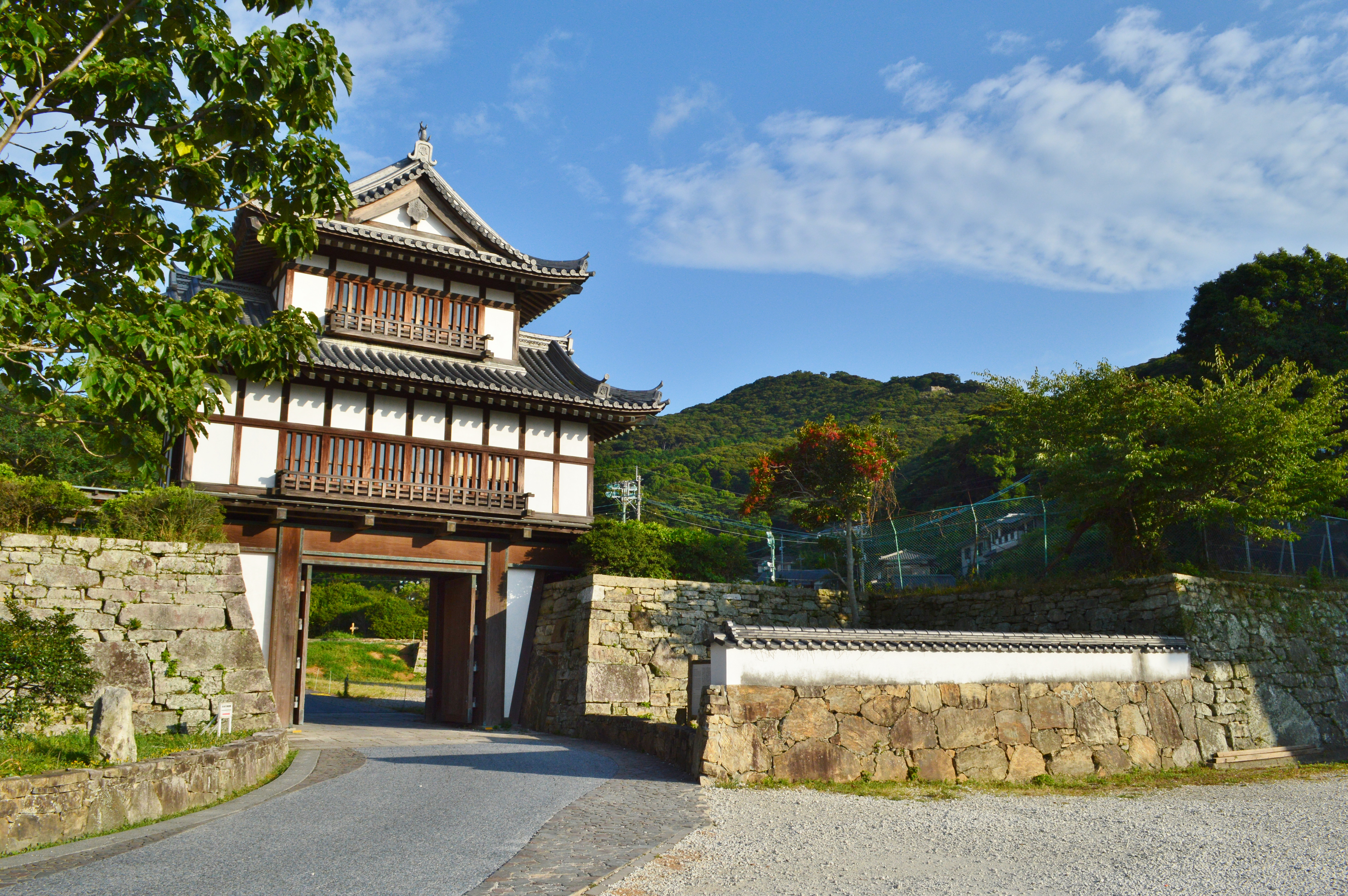 金石城 櫓門 (背景に清水山城)